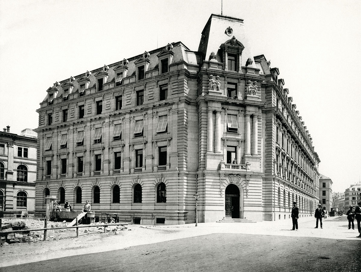 Eidgenössisches Telegraphen-Gebäude, Bern. Erbaut 1891—1893 von 0tto Dorer und Adolf Füchslin.